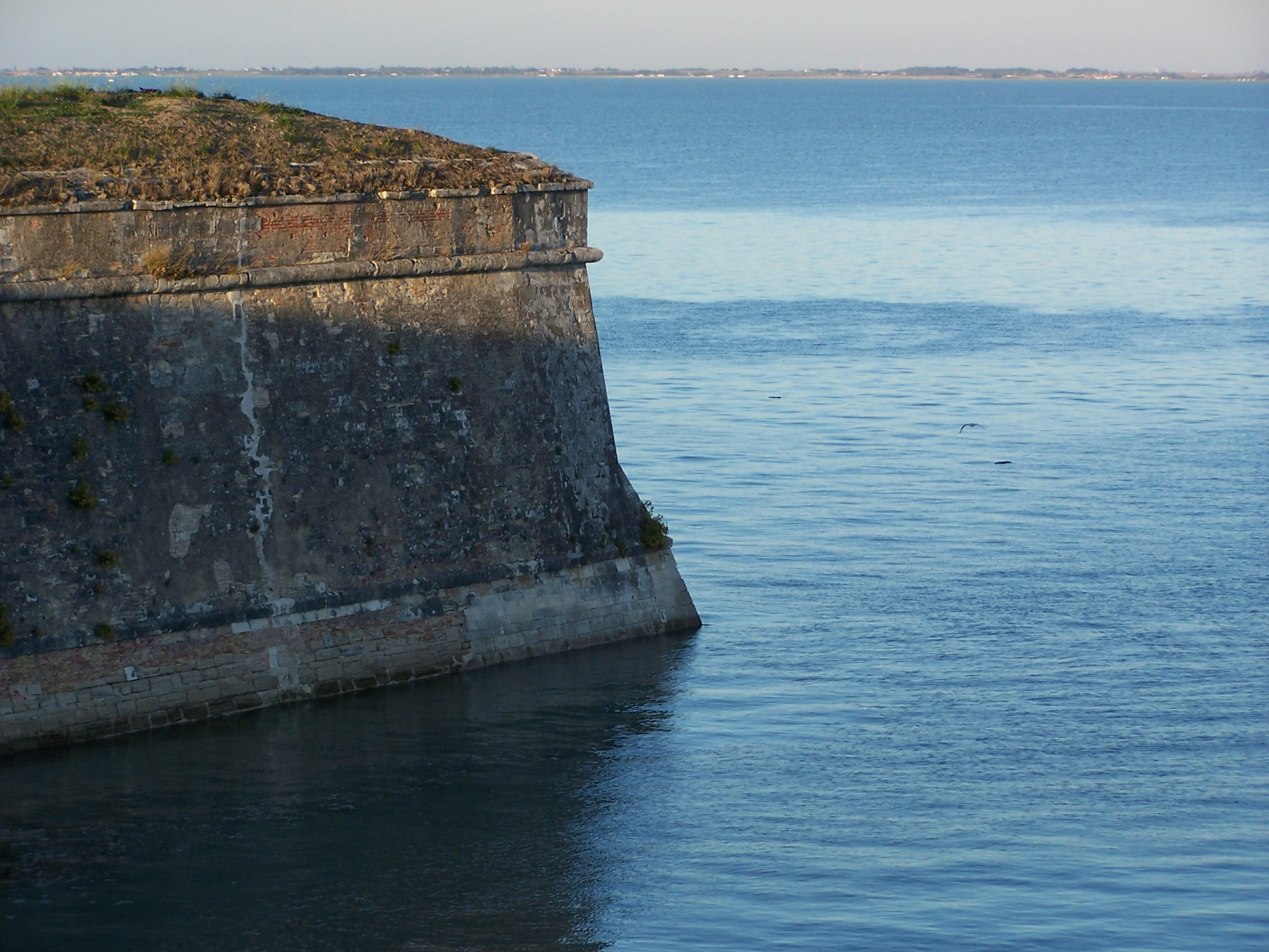 Photographie de la citadelle du Château-d'Oléron, commune française, située sur l'île d'Oléron dans le département de la Charente-Maritime et la région Poitou-Charentes. Dès la fin du XIème siècle, la citadelle défendait l'embouchure de la Charente. Sa situation géographique, lui permettait de protéger Brouage, et surtout Rochefort, qui était une ville stratégique. La construction de la citadelle a débuté sous le règne de Louis XIII, et a été achevée par Vauban vers la fin du XVIIème siècle. Pendant la Révolution française les fortifications servirent de prison, et en 1939 la citadelle fut désertée par les militaires.